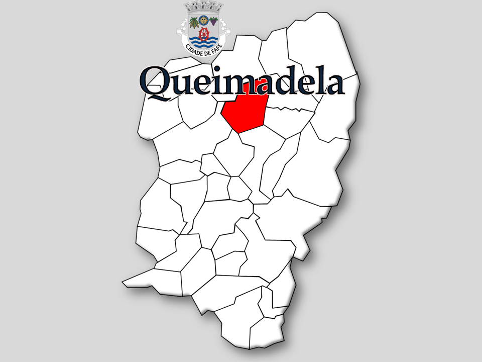 Censos 1864/2011